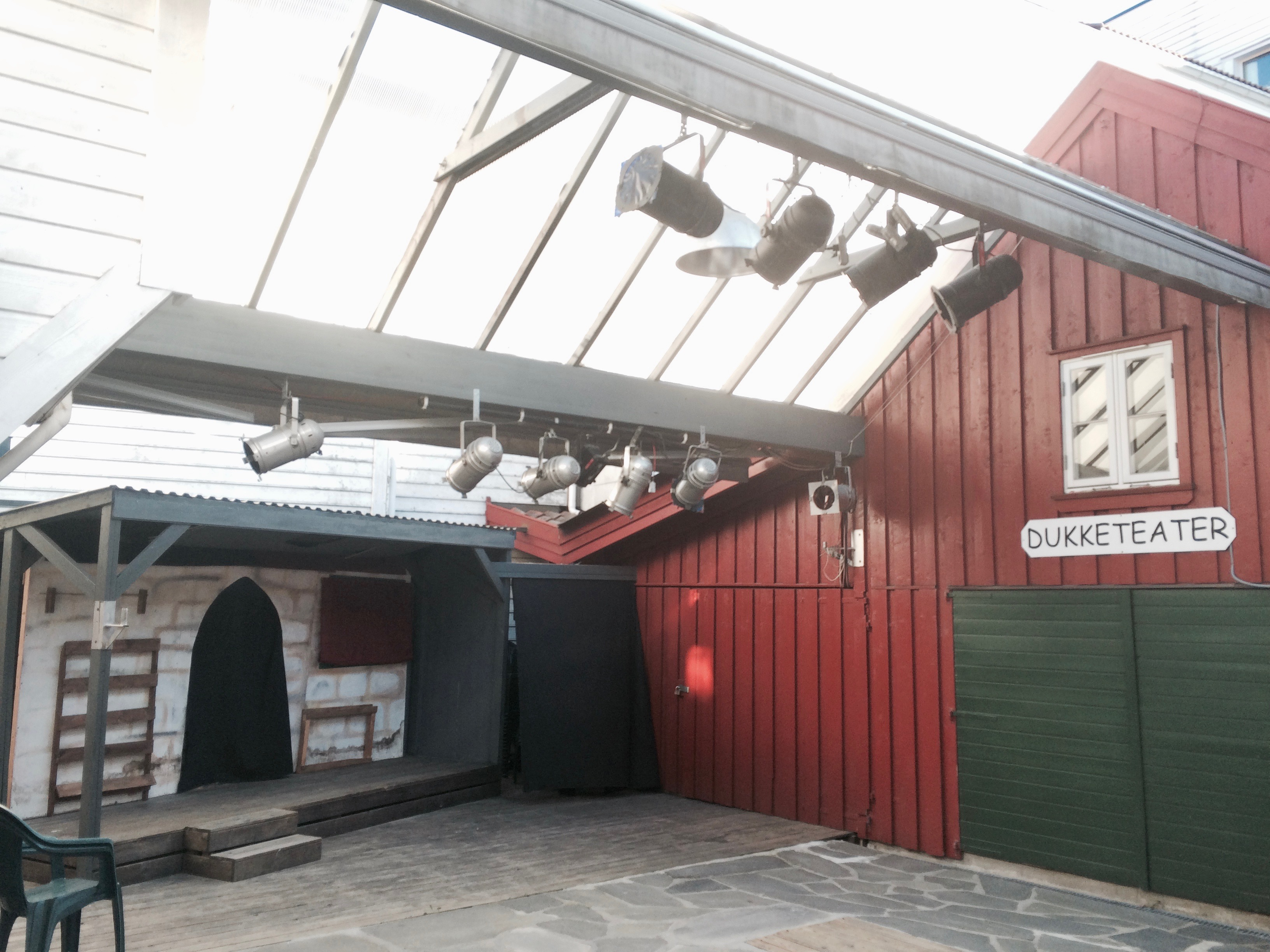 Bakgården, Arken kulturhus i Lillesand